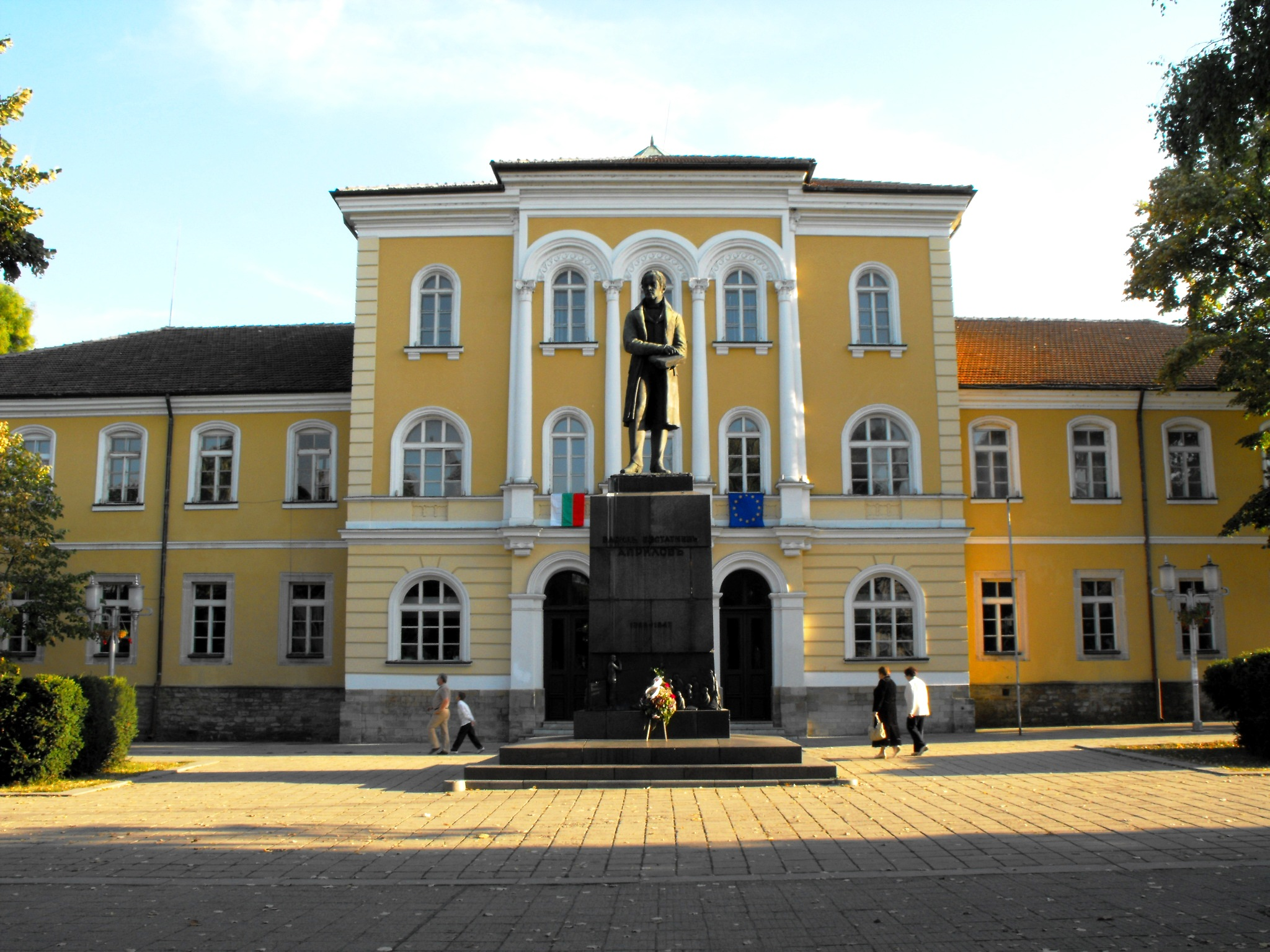 Априловската гимназия e първото светско училище в България, създадено през 1835 г. в град Габрово.